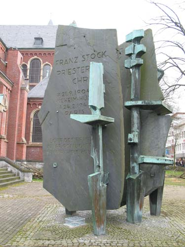 Franz-Stock-Denkmal in Arnsberg-Neheimer, Neheimer Markt, von Josef Rikus, Einweihung 29.09.1965